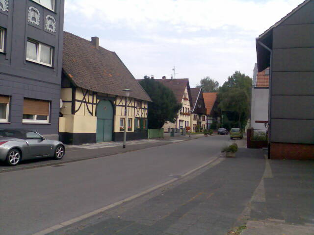 Der Ortsteil Crange von Herne in Deutschland